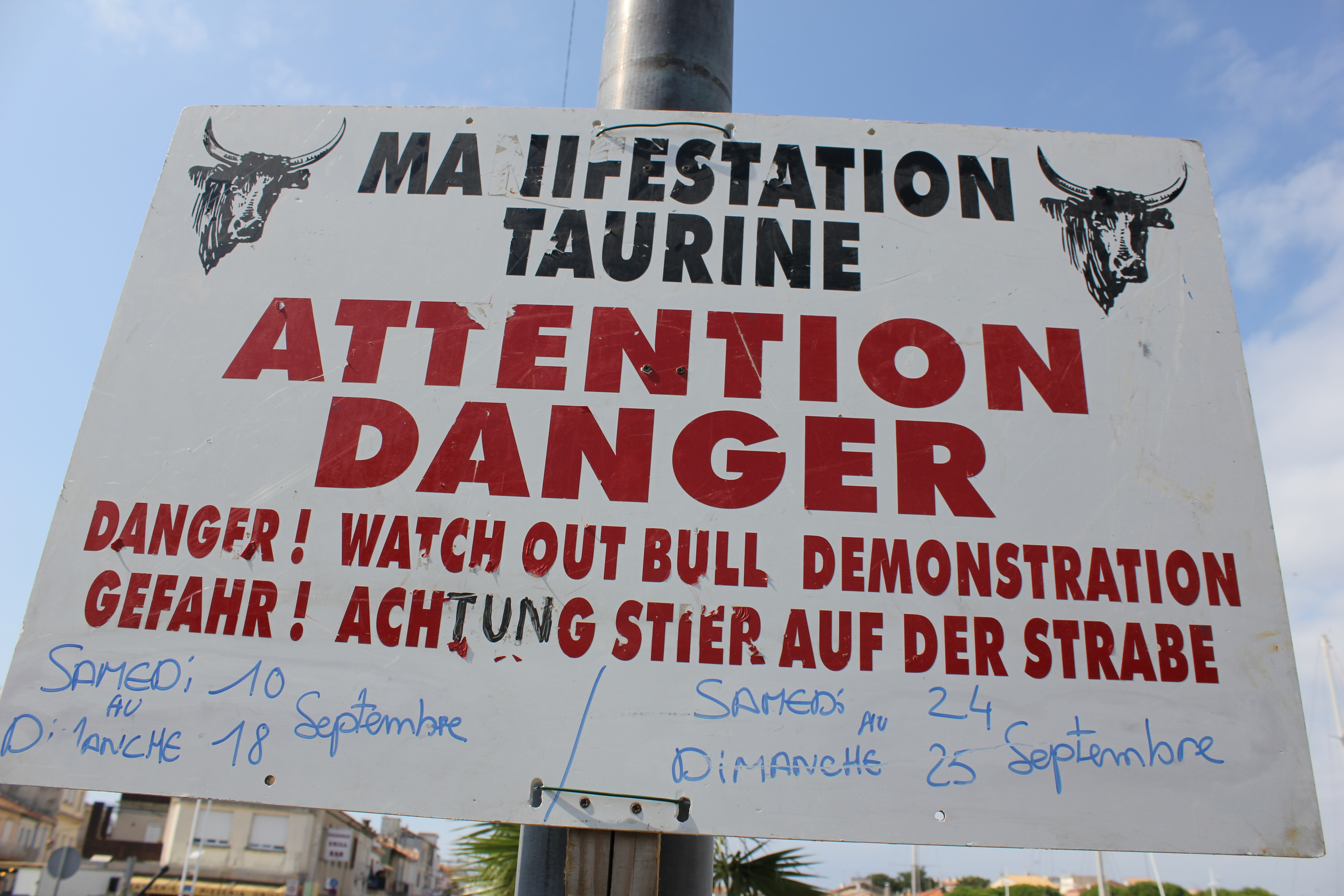 Waarschuwing